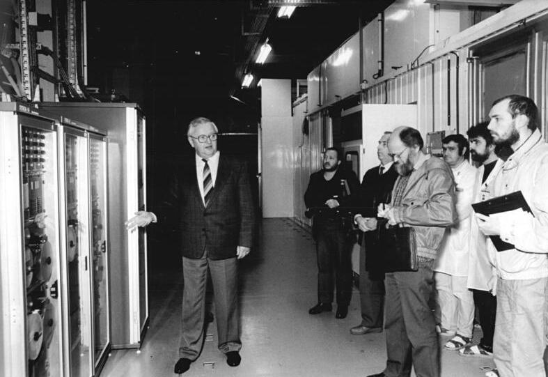 Erfurt, VEB Mikroelektronik, Delegation des "Neuen Forums" ADN-ZB Ludwig-11.11.89 Erfurt: Fragen des Umweltschutzes erörterten Mitglieder einer Fachgruppe des Neuen Forums gemeinsam mit Verantwortlichen und Werktätigen in neuen Produktionsstätten des VEB Mikroelektronik "Karl Marx". Betriebsdirektor Dr. Rolf Hillig (l.) vom Betriebsteil Erfurt-Süd informiert über den Meßpunkt zur Überwachung für toxische Gase. Für den Produktionsprozeß benötigt das Werk Spezialgase.